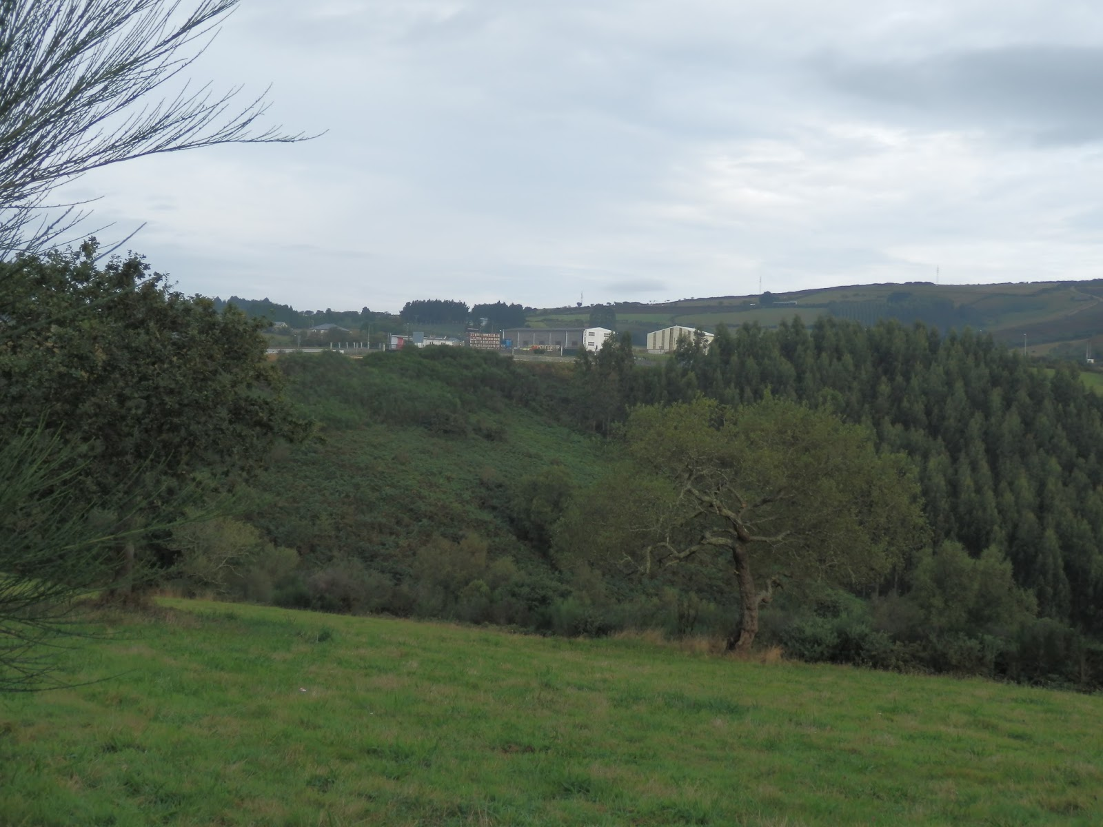 Vista do Alto da Xesta, Quende, Abadín, España